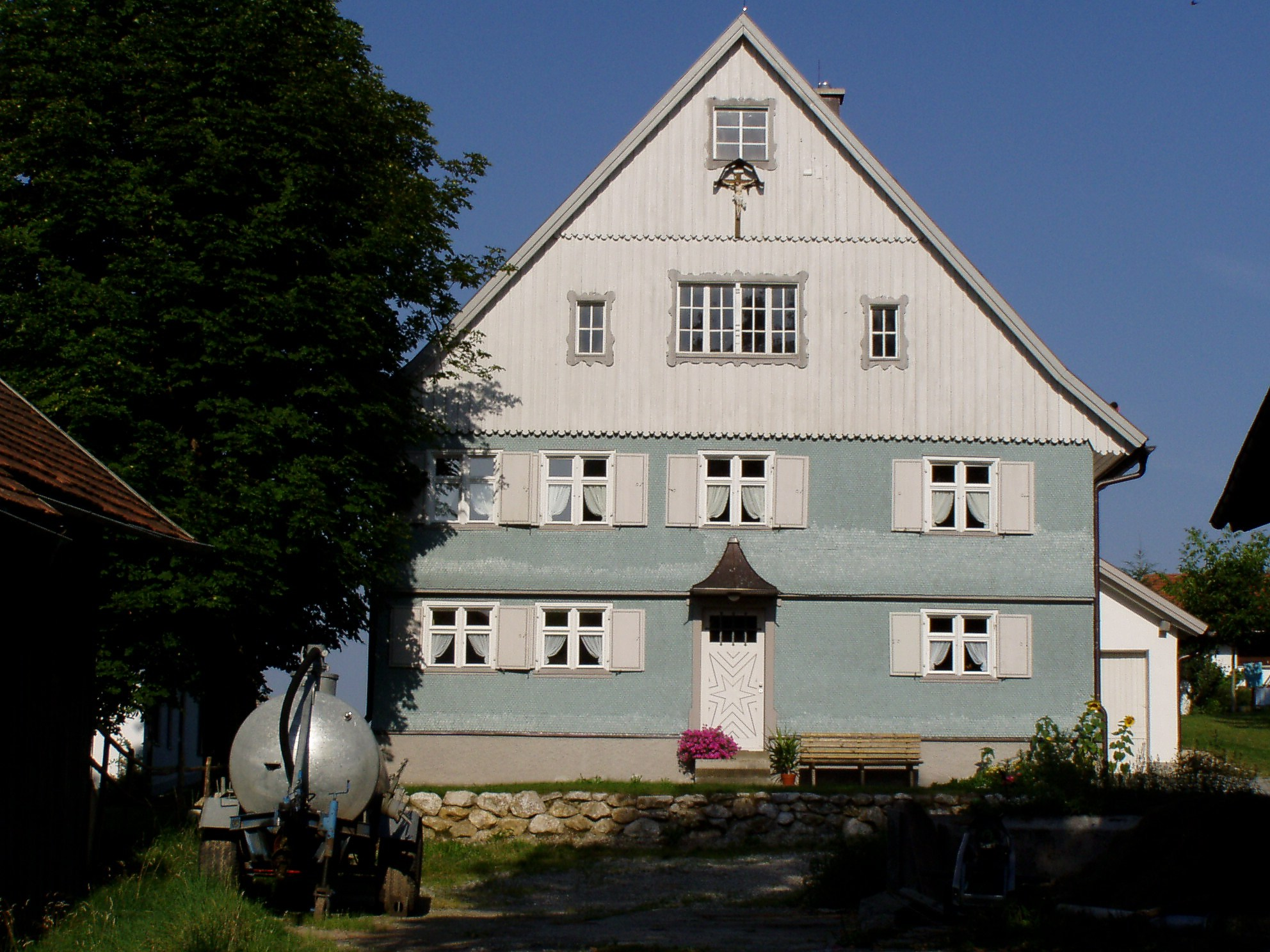 Pfarrhof in Bodelsberg, Durach